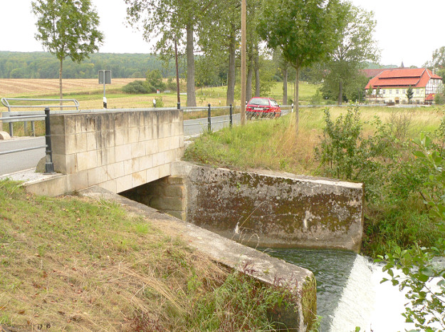 Die Nette bei Henneckenrode Foto aufgenommen von Benutzer User:Axel Hindemith, August 2006